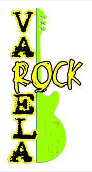 Logo del festival Varela Rock. Dicho festival es gratuito (no se cobra entrada y las agrupaciones musicales tocan gratis también) y sin fines de lucro, la imagen no esta sujeta a derechos de autor.